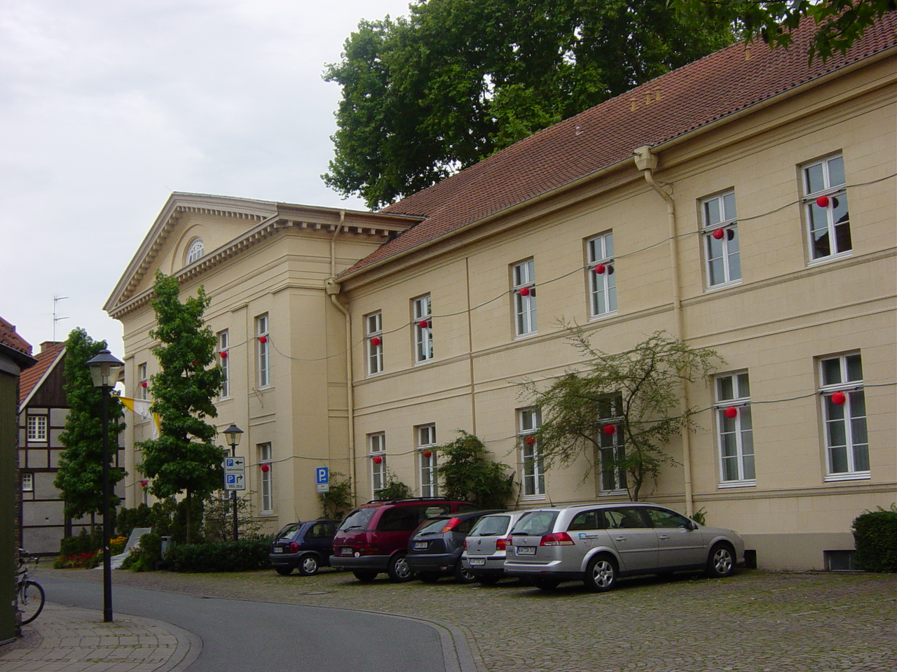 Warendorf Volkshochschule